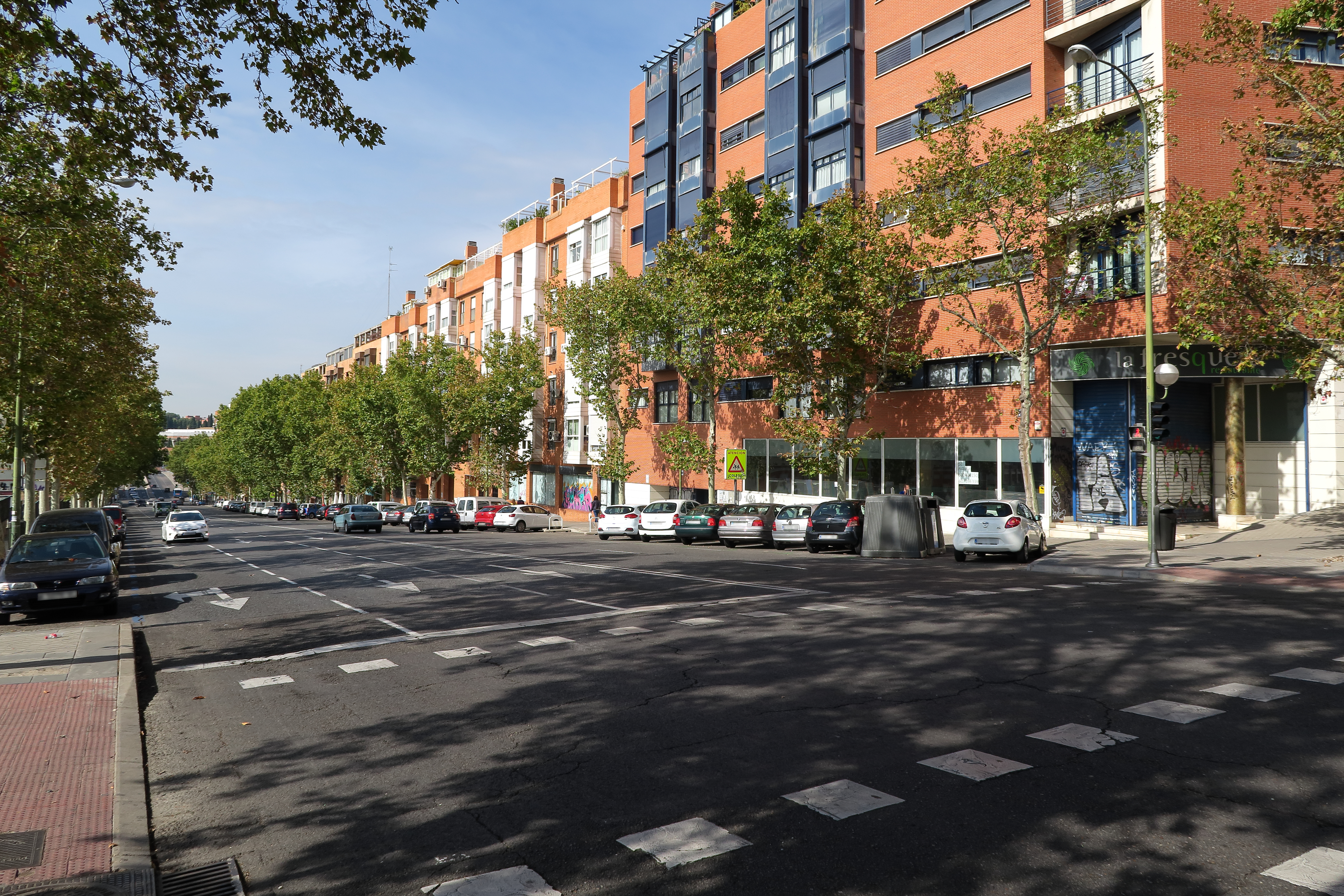 Paseo de Pontones, desde la plaza de Francisco Morano (en 2016)